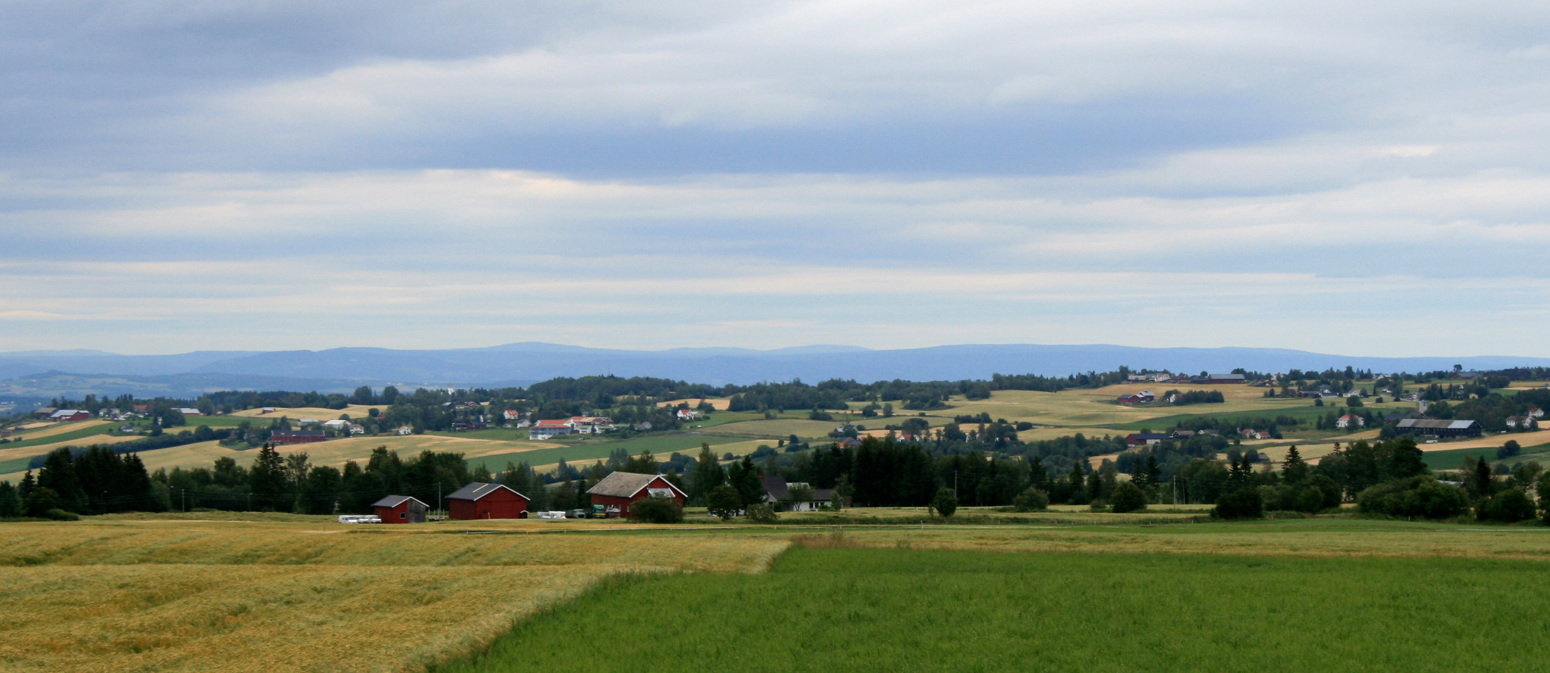 Parti fra Østre Toten.